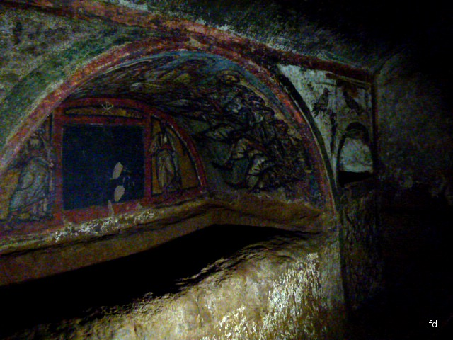 Domitilla Katakombe Besondere Grabstelle